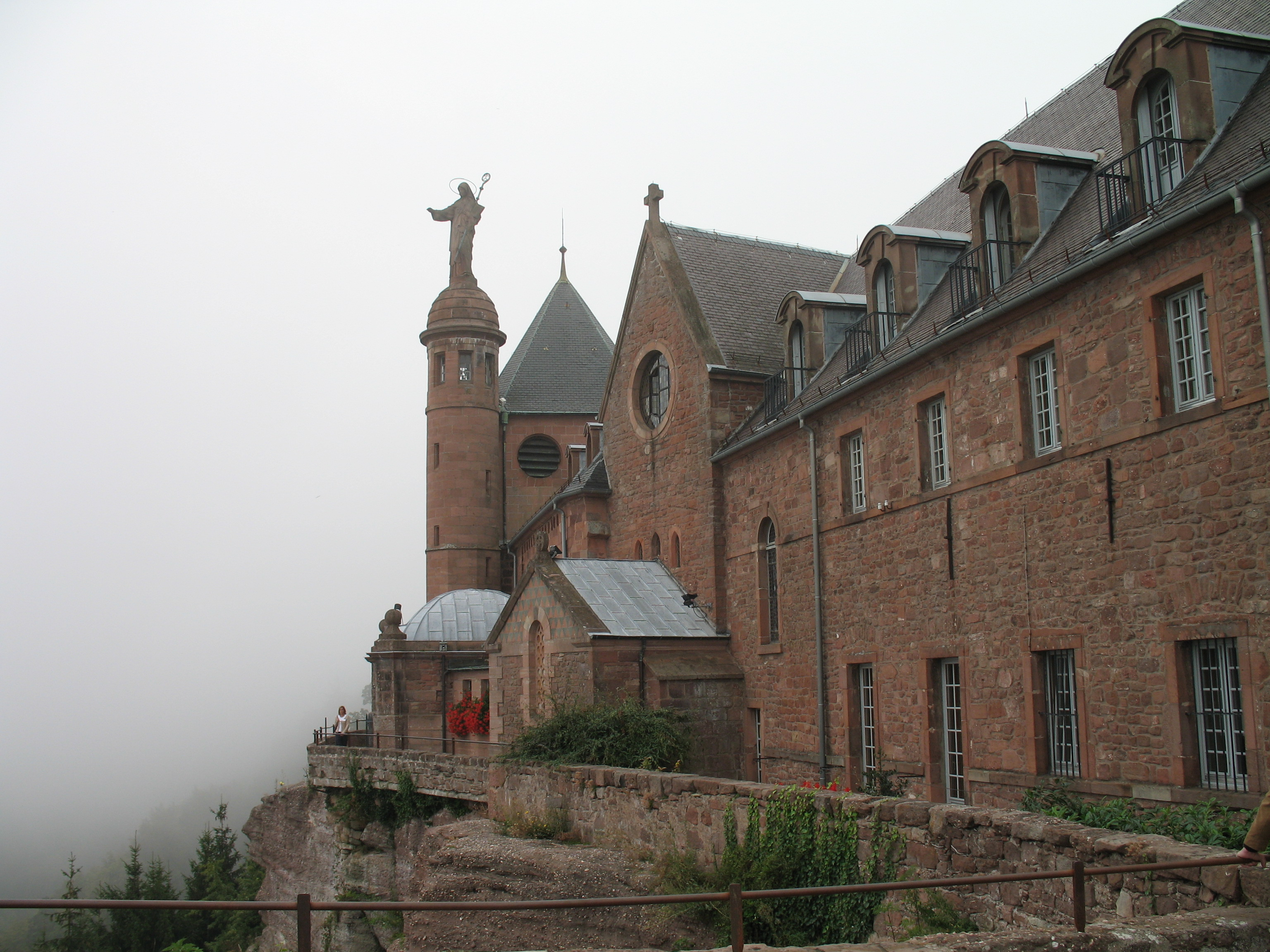 Mont sainte-odile in Alsace, FranceMont sainte-odile